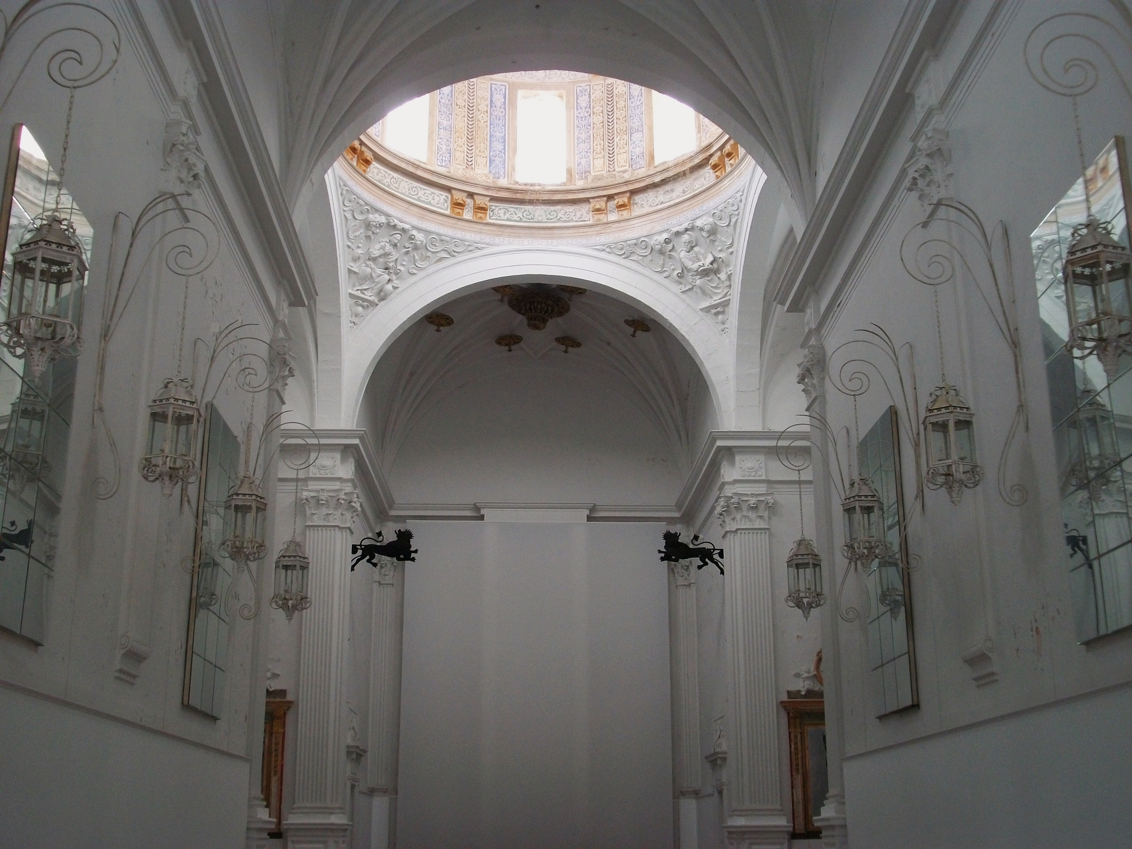 Interior de l'església de la cartoixa d'Ara Christi, el Puig, Horta Nord, País Valencià.